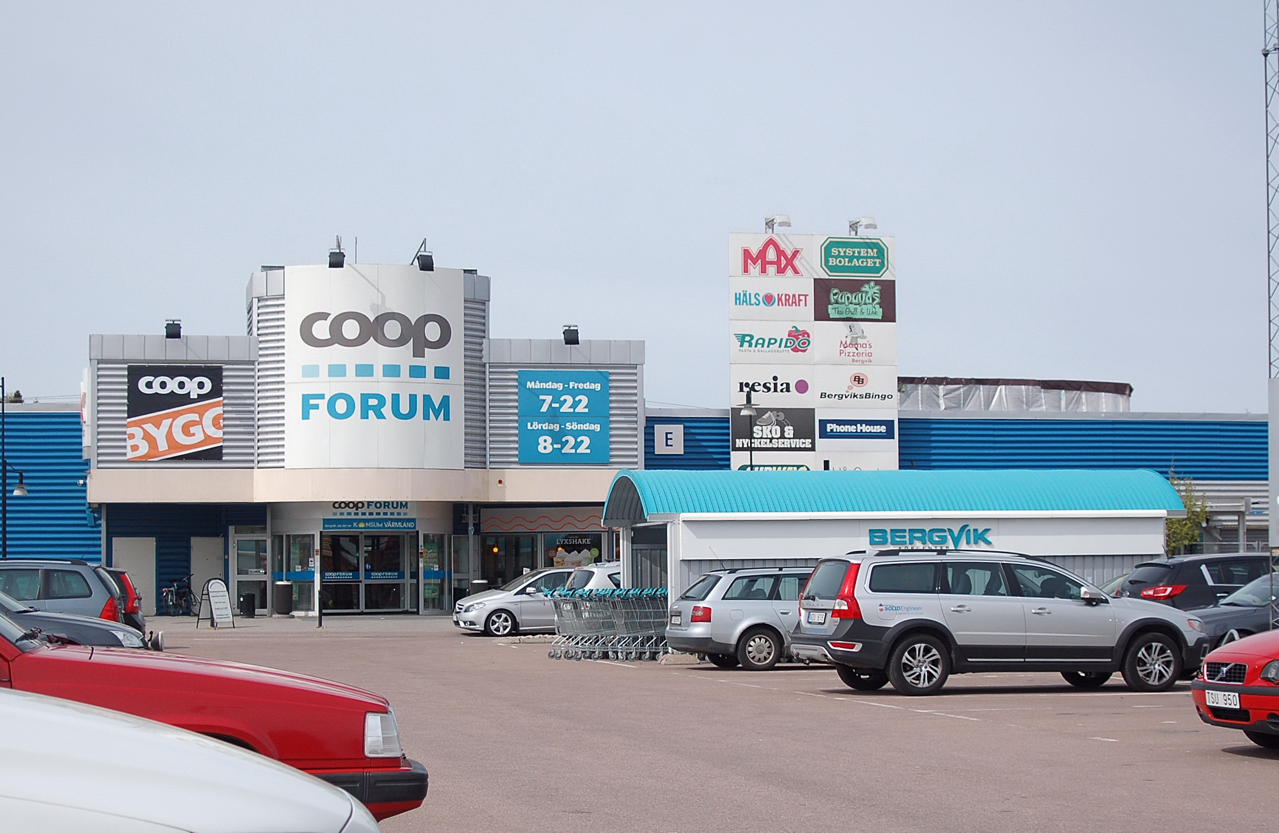 Entré till Coop Exta Stormarknad på Bergviks köpcenter Karlstad.